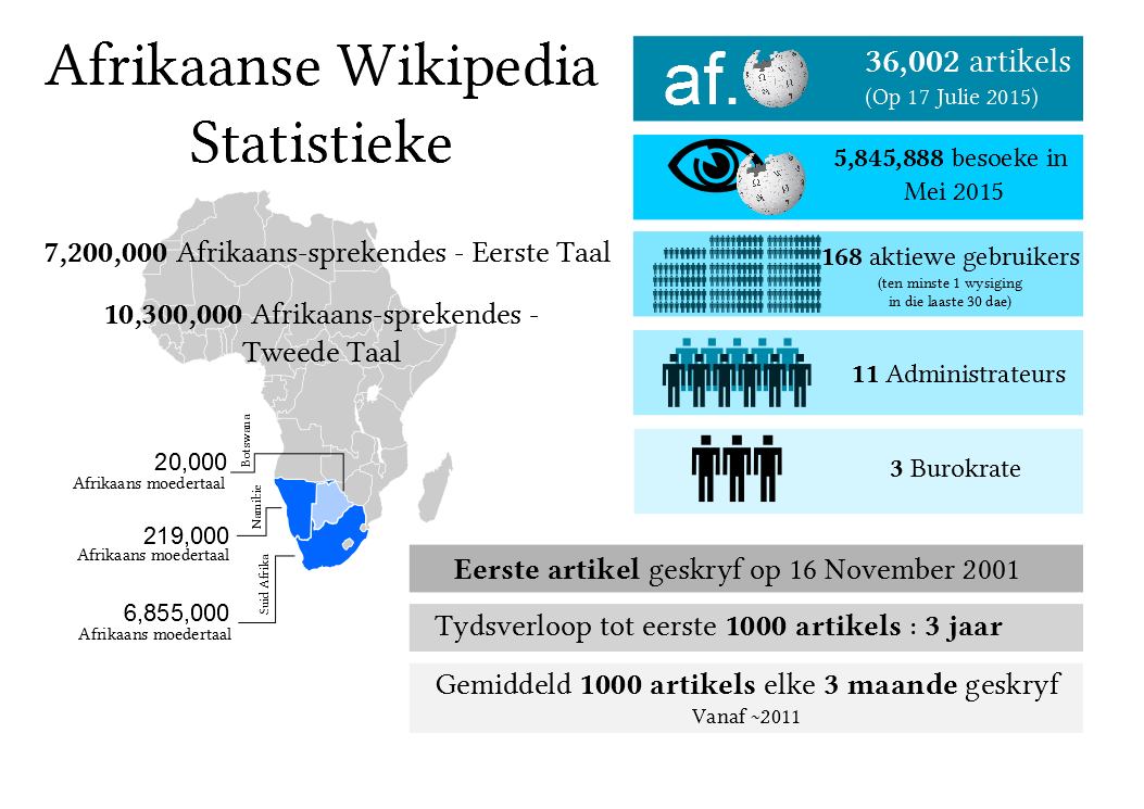 Afrikaans Wikipedia Statistieke - Julie 2015